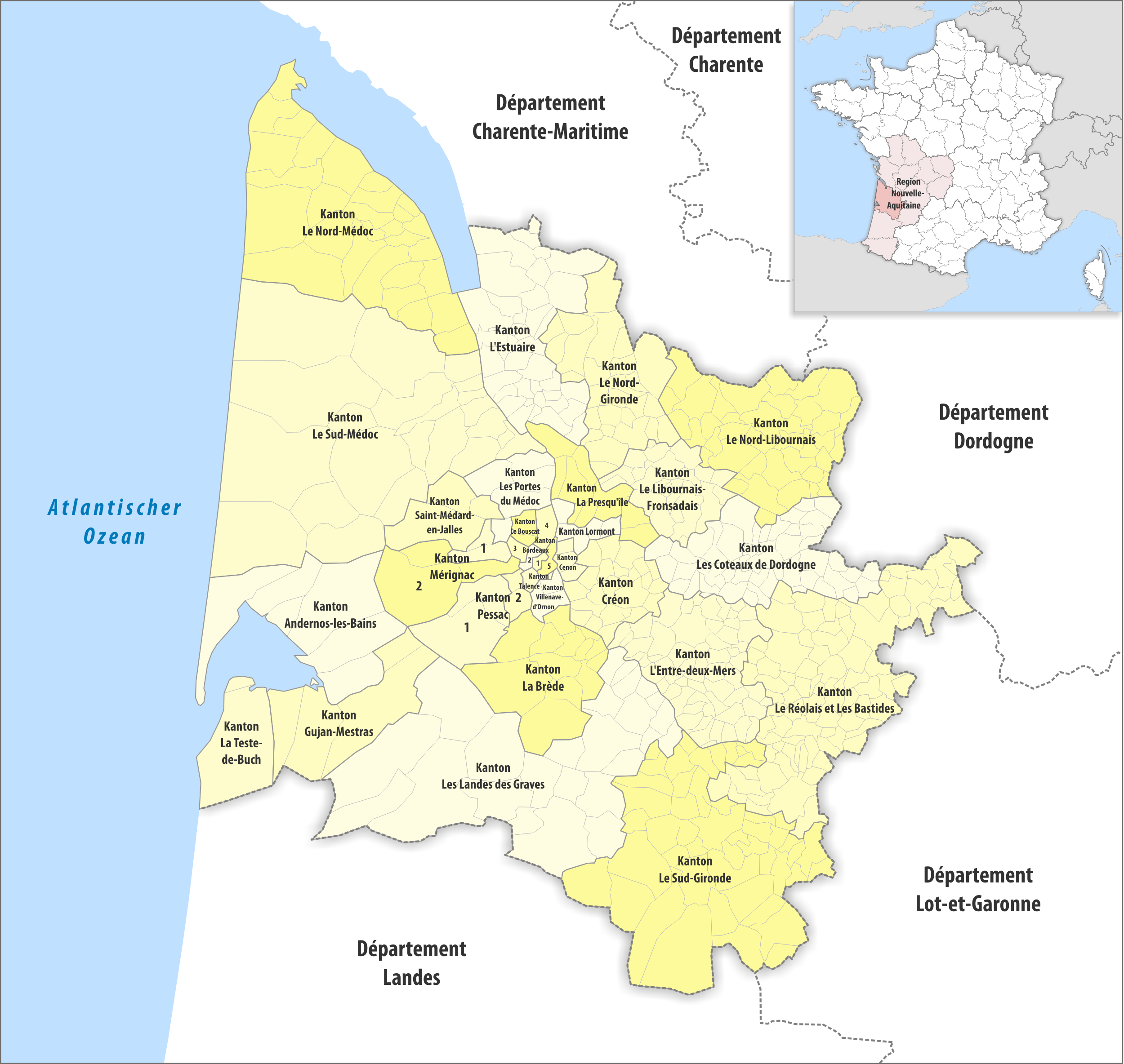 Gemeinden und Kantone im Departement Gironde